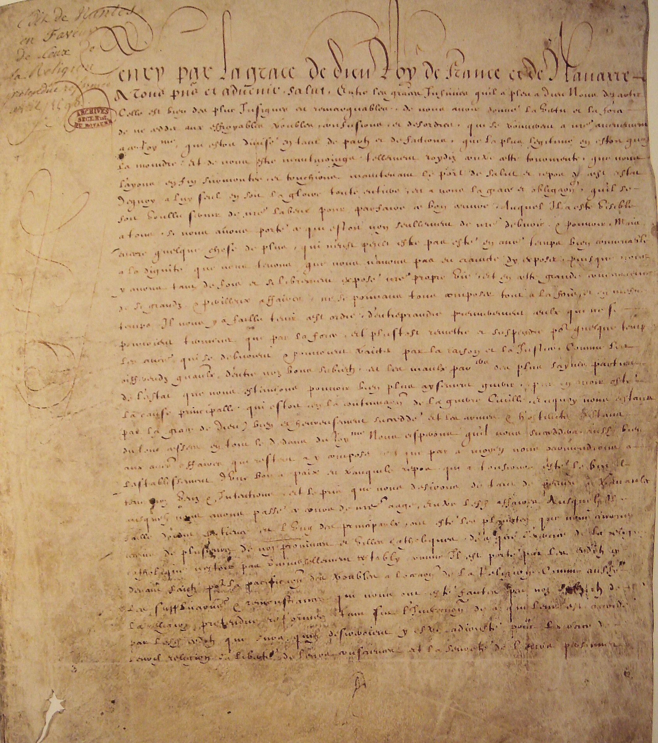 Édit de Nantes, première page